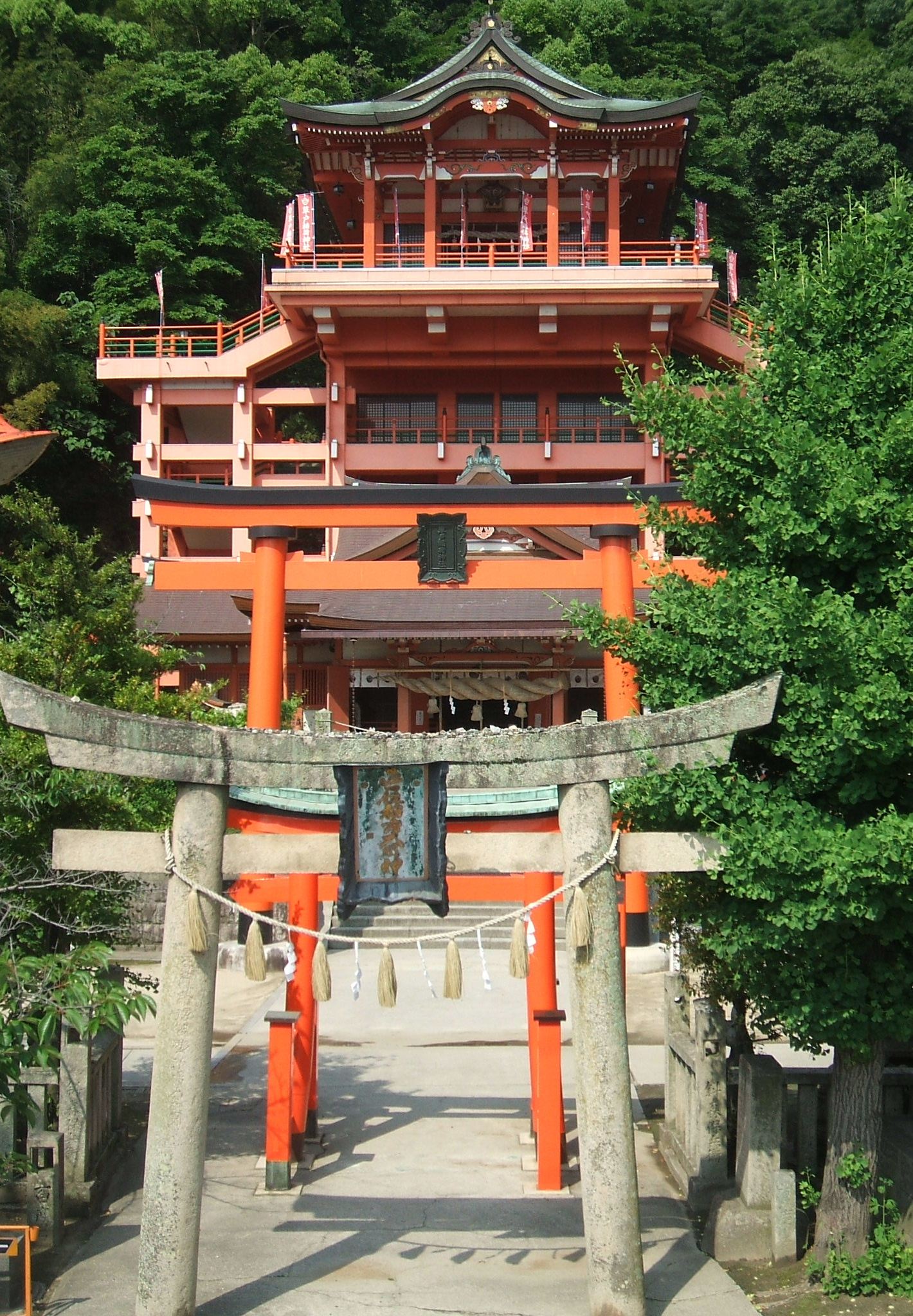 広島県福山市にある草戸稲荷の建築物